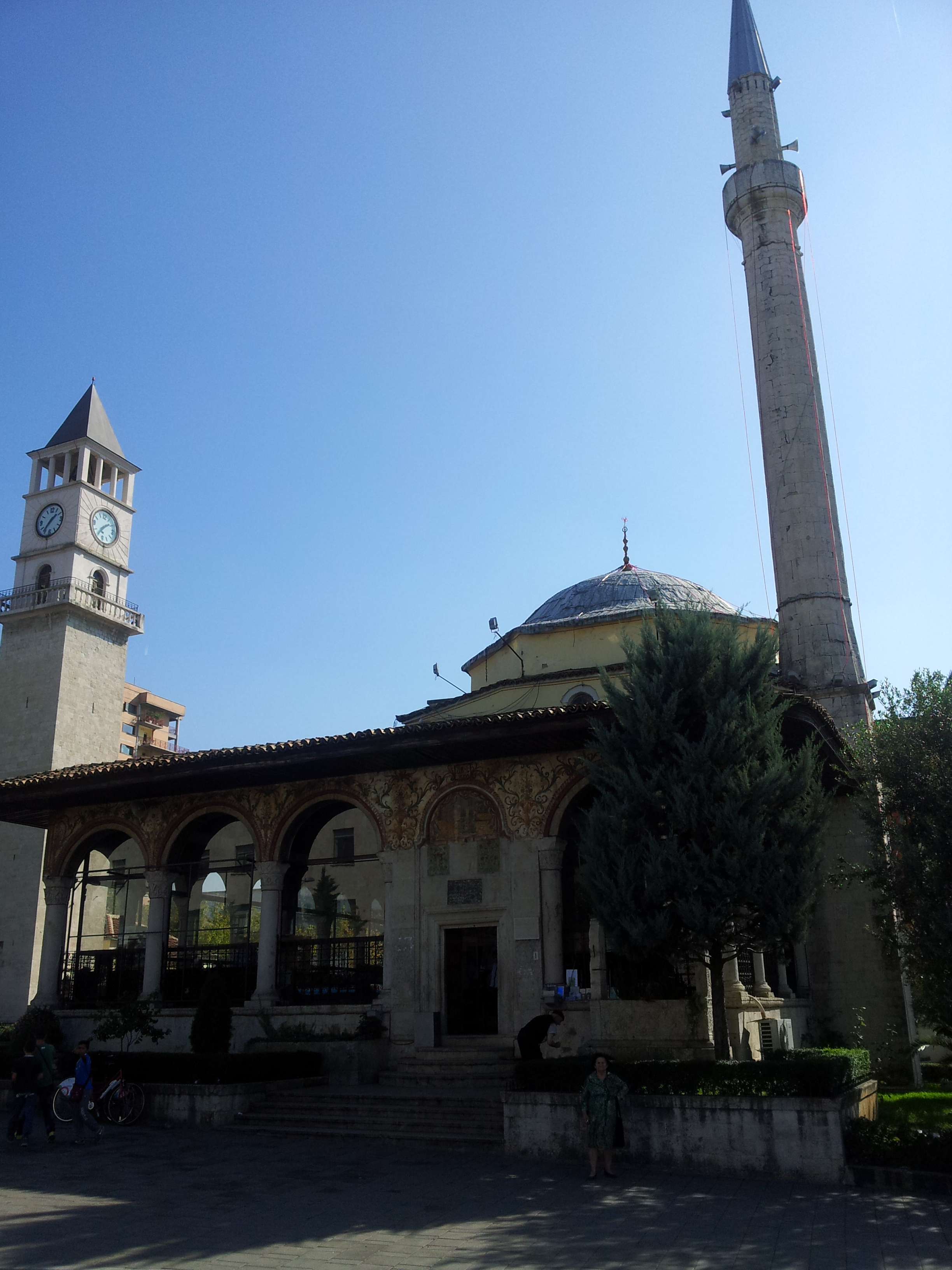 Xhamia e Ethem Beut, Tirane. Xhamia bashke me minarene e saj. Ne sfond duket edhe Kulla e Sahatit e Tiranes.